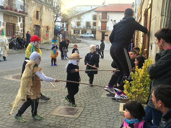 Urdiaingo ihoteak (ihauteriak)